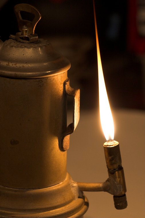 Acetylenflamme einer Fahrradkarbidlampe